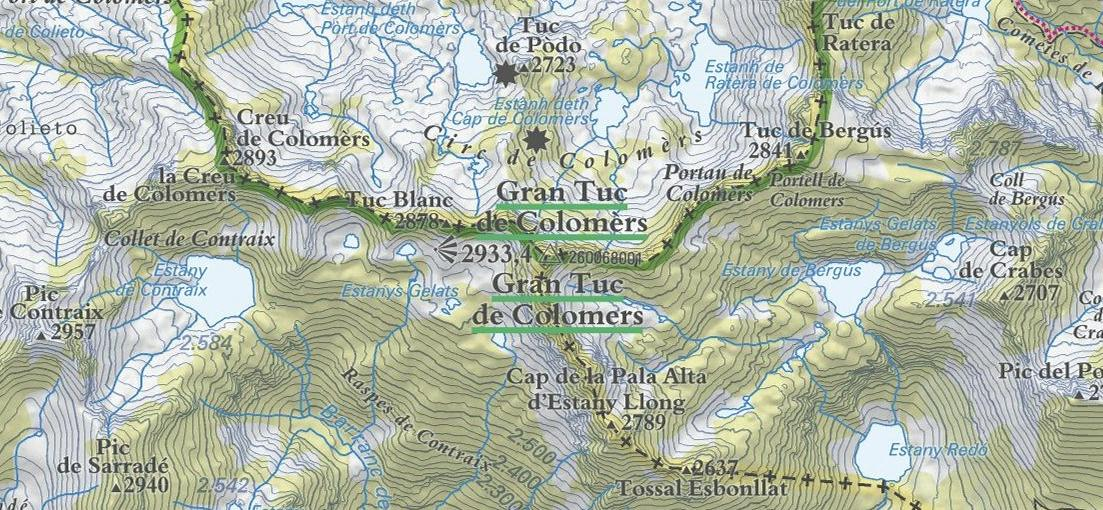 Plano topográfico 1:50.000 del Gran Tuc de Colomèrs